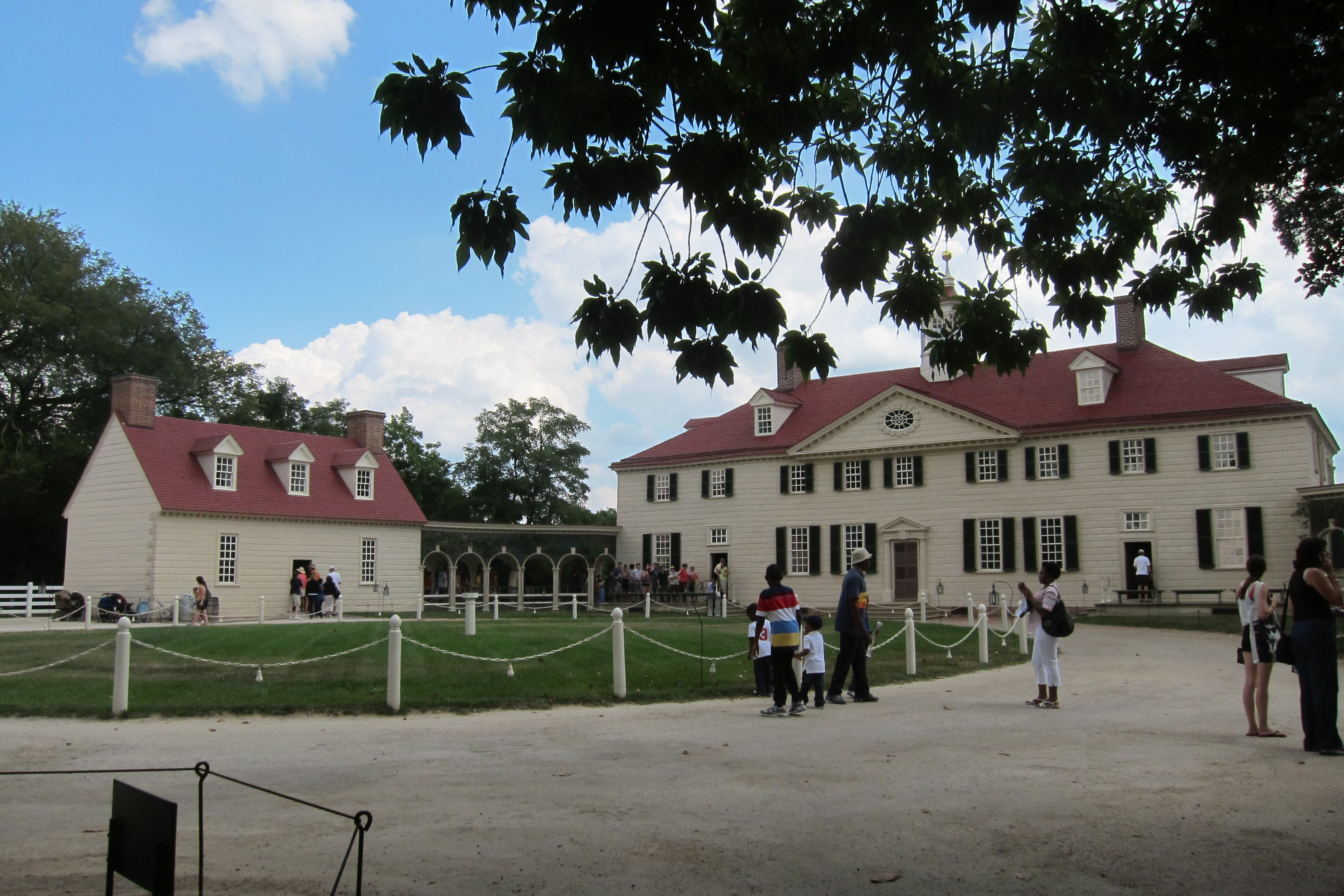 සිංහල: වර්ජීනියාවේ ජෝර්ජ් වොෂිංටන් ජීවත් වූ මවුන්ට් වර්නන් නිවස